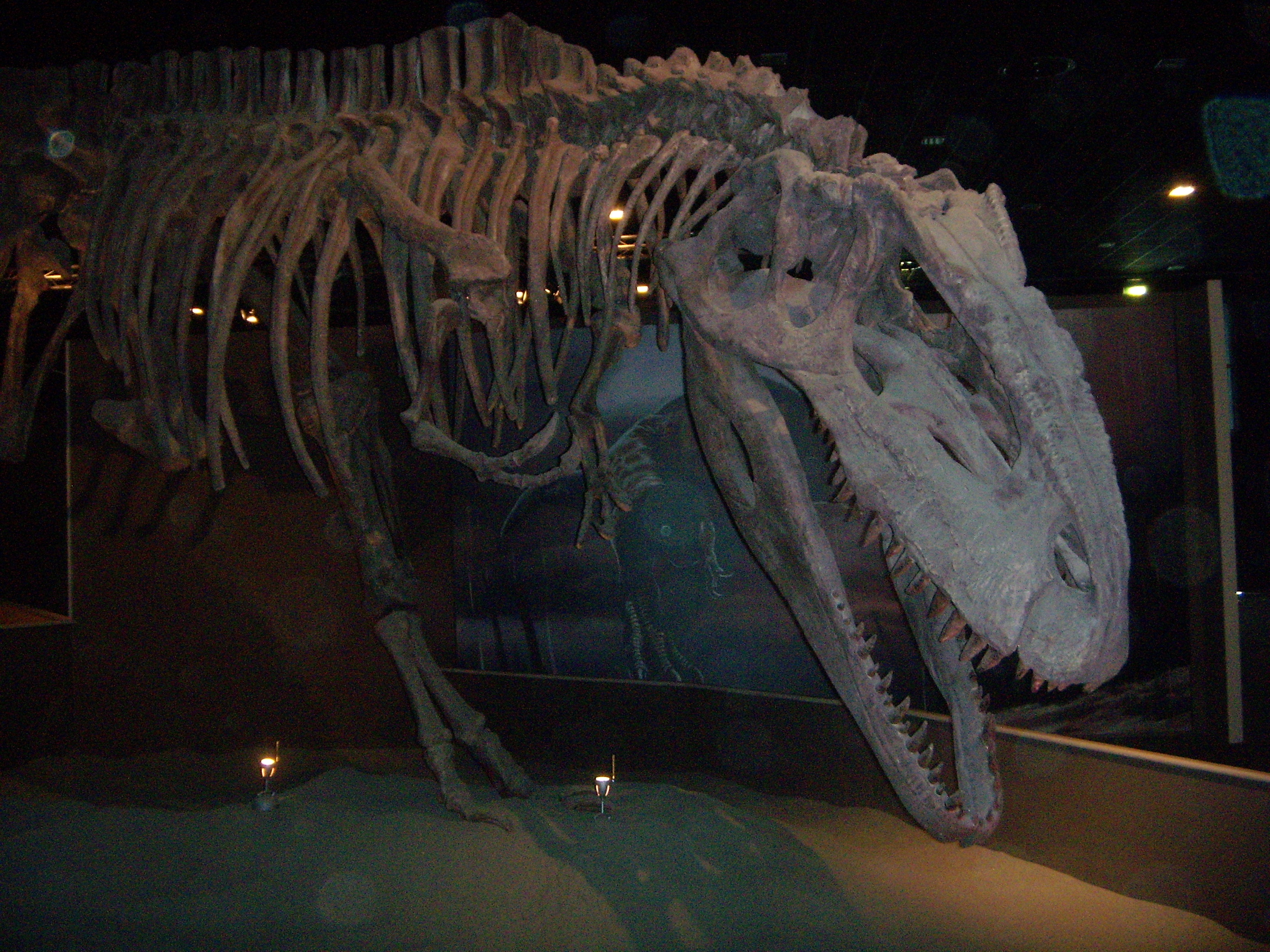 Arezzo Fiere e Congressi Srl